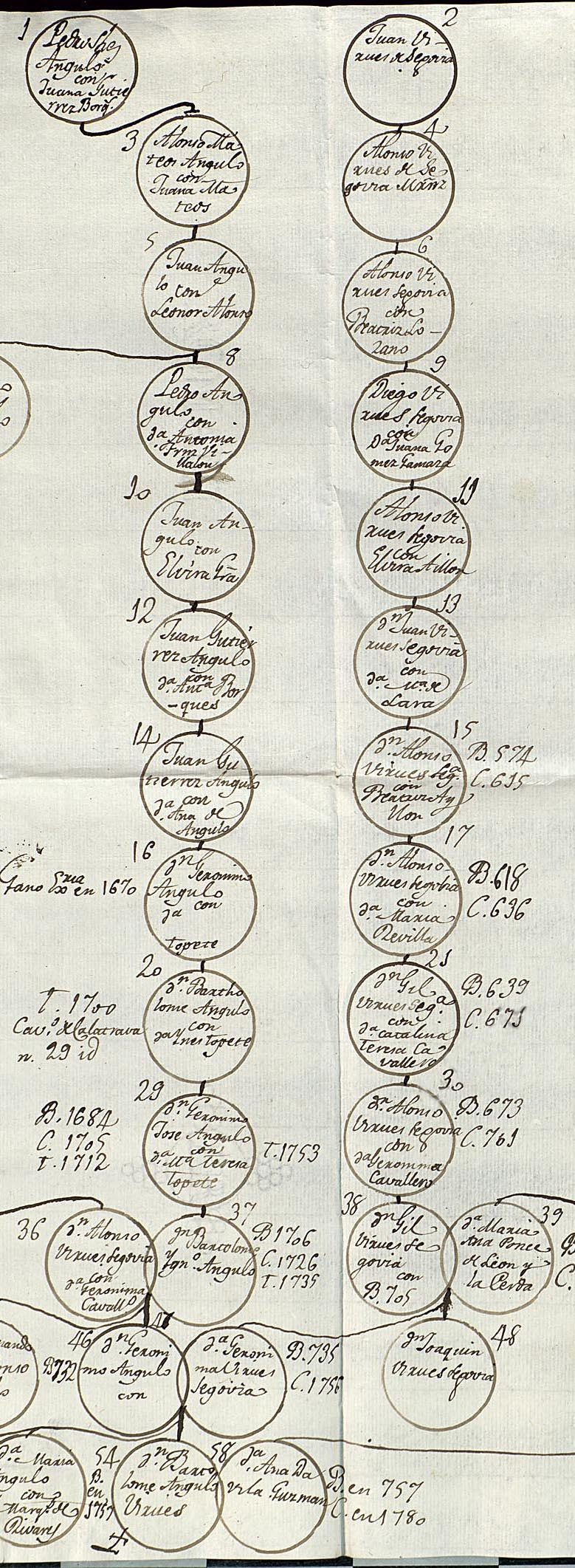 Ascendencia de Bartolome Angulo Virues